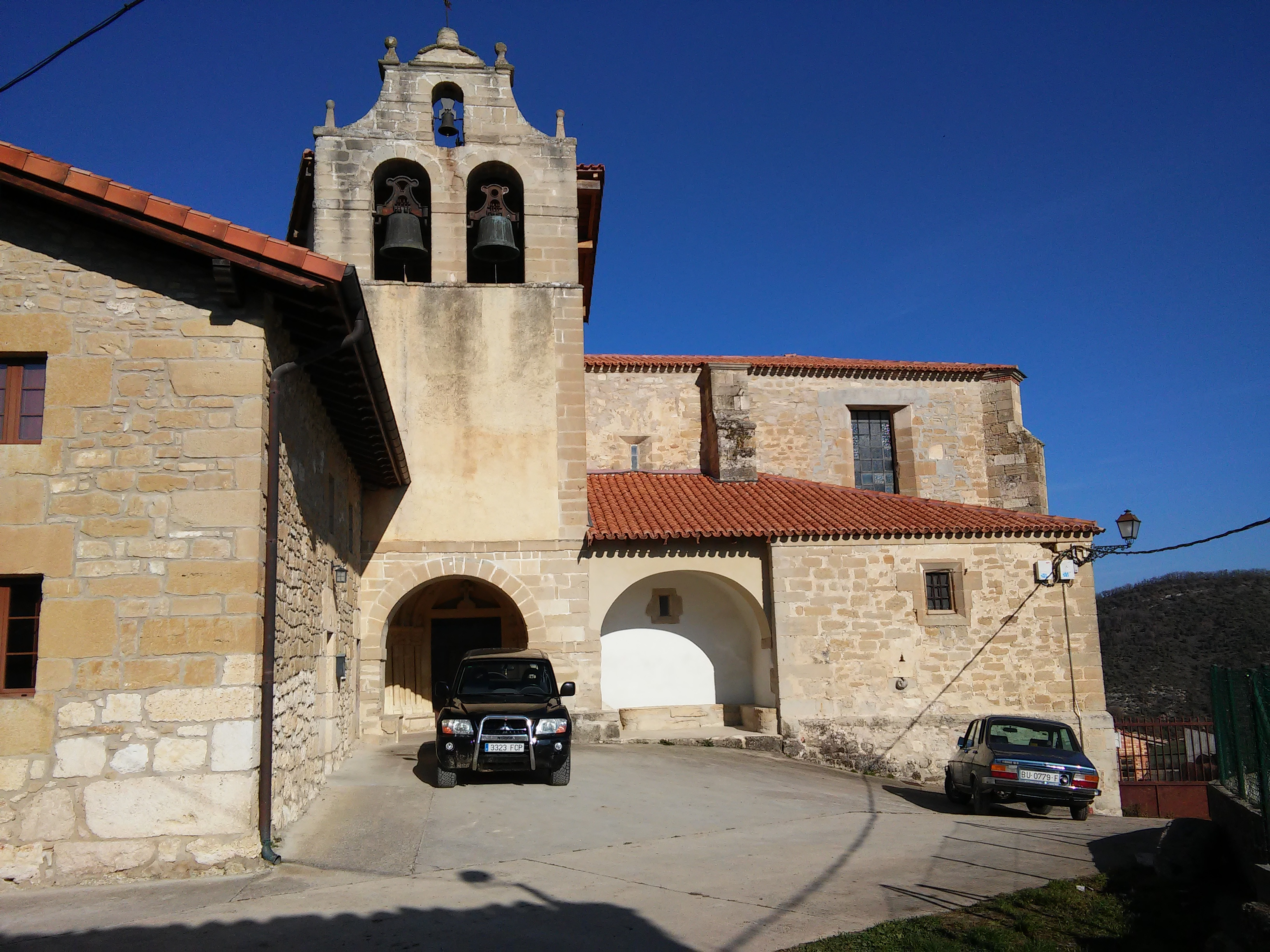 Dordonizko eliza